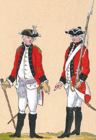 44. Regiment Pieszy Ordynacji Ostrogskiej